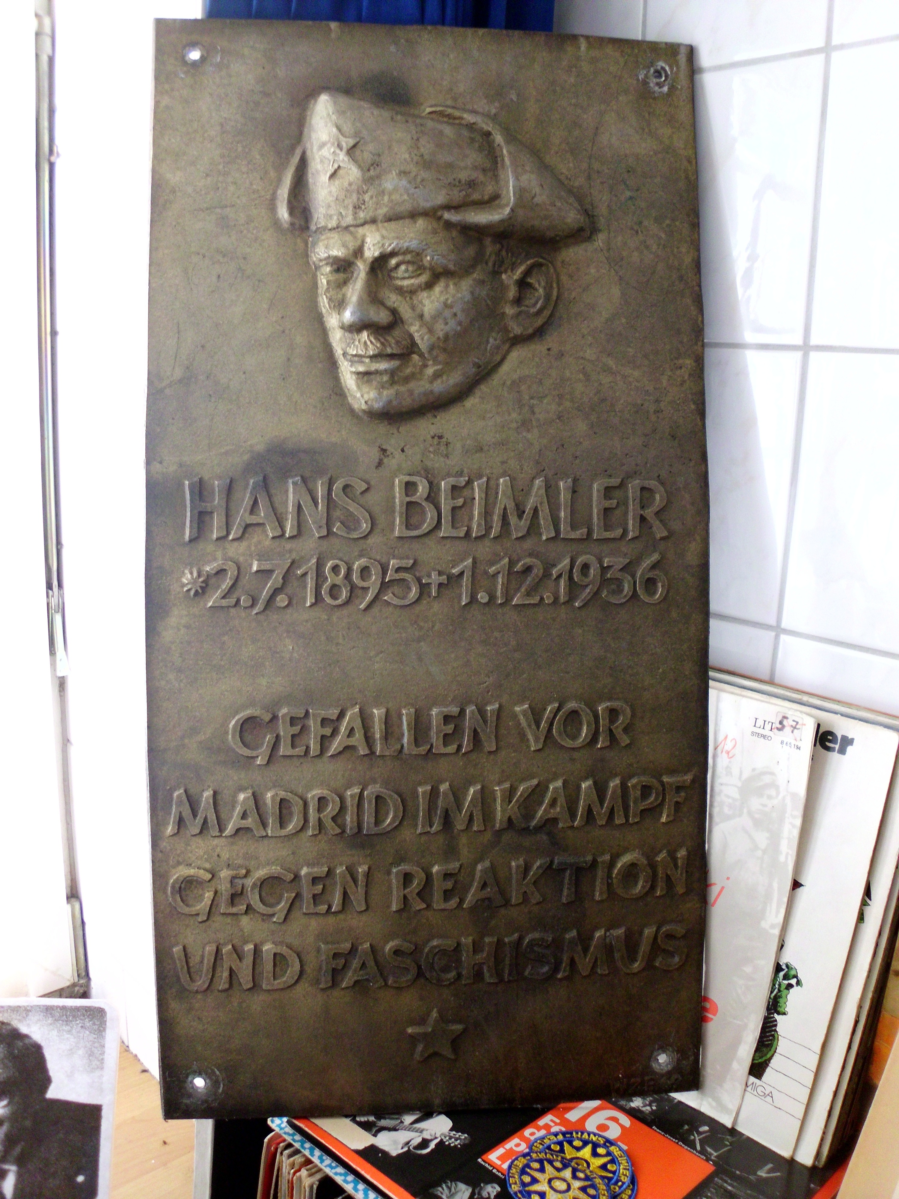 Beimler-Tafel des ehemaligen Beimler-Gedenksteins, der auf dem Schulhof der jetzigen Rolandschule stand, heute im DDR Museum Perleberg zu sehen